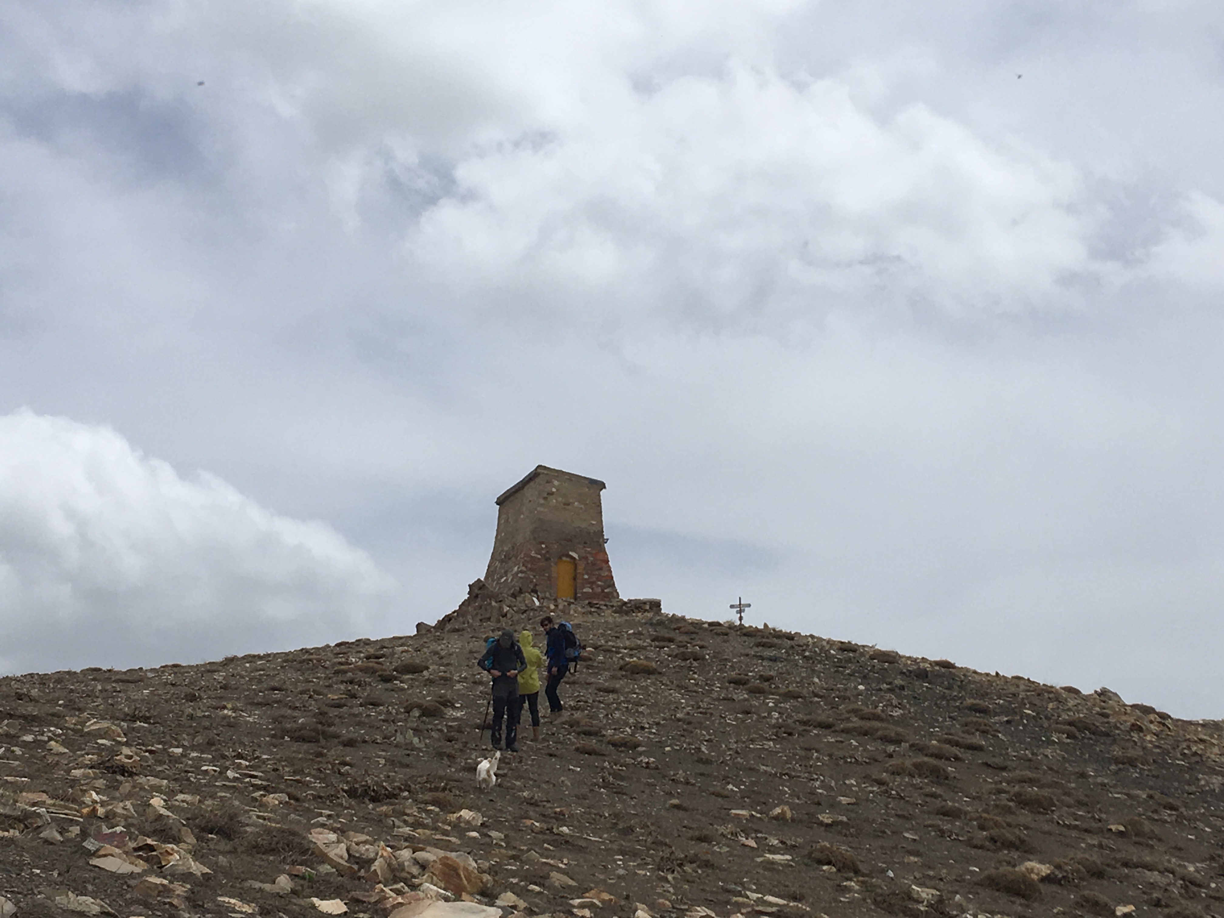 اسپید کمر نخستین پناهگاه کوهنوردی ایران است